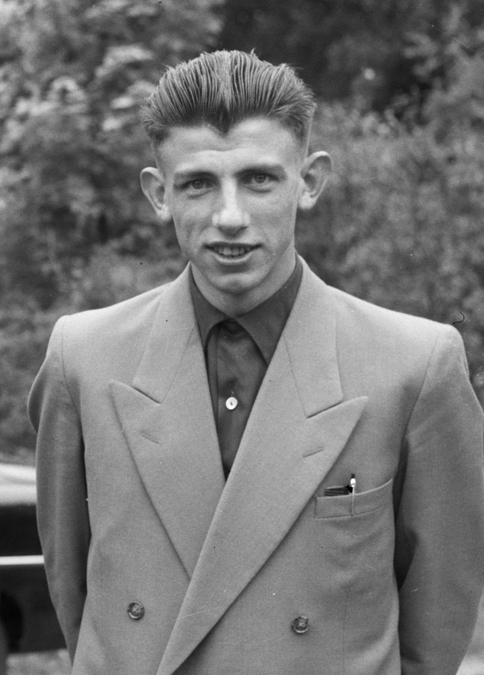 Ondertekening van contracten van Tour de France ploeg thuize van Van Rees Pellenaars te Breda, Thijs Roks